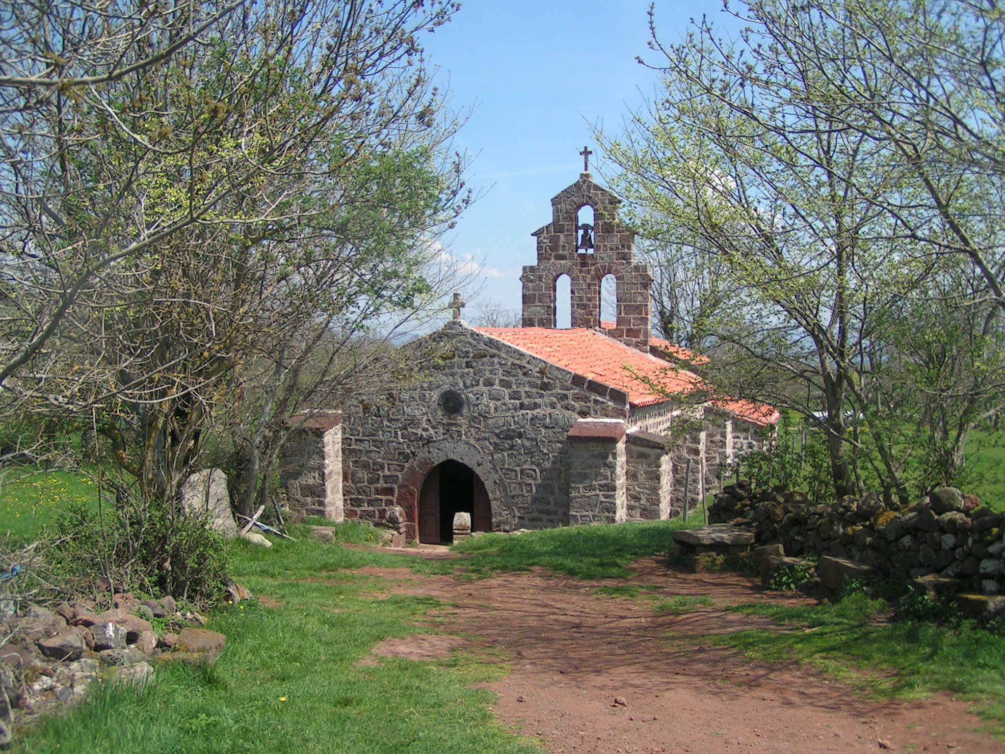 Chapelle Saint-Roch à Montbonnet sur le chemin de saint-Jacques de Compostelle du Puy à Conques